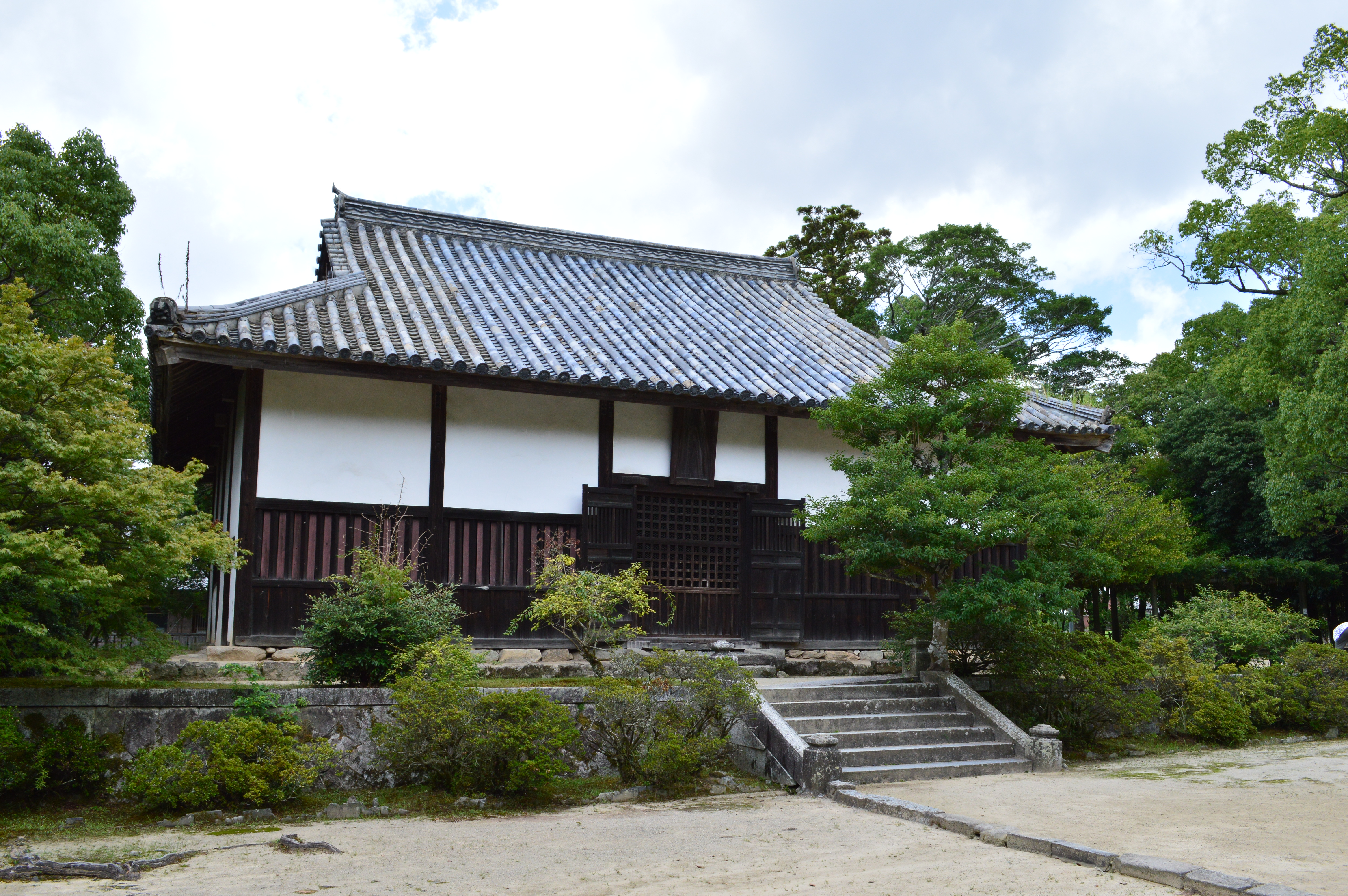 観世音寺 (太宰府市) 金堂